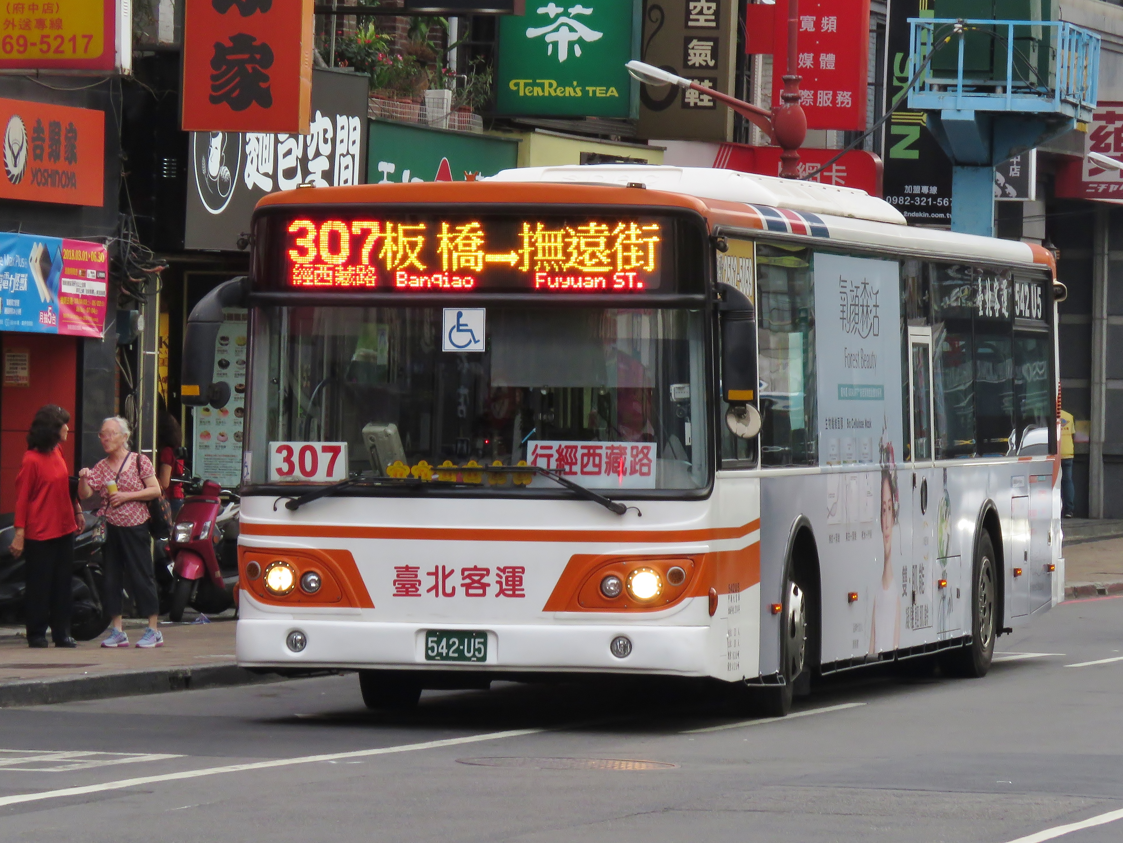 2014 DAEWOO BS120CN 542-U5307路(經西藏路) 板橋→撫遠街